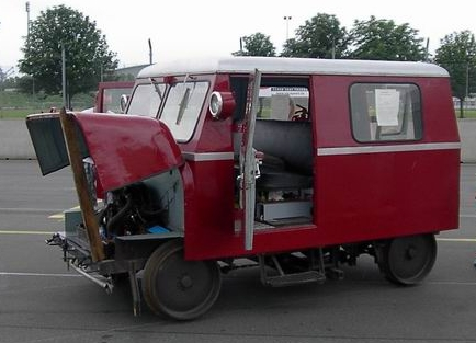 Motordraisine Klv 12-4904 der ehemaligen Deutschen Bundesbahn (DB), wird seit 1986 von der Fränkischen Museums Eisenbahn (FME) betriebsfähig erhalten. Bauart: Klv 12 Hersteller: Beilhack 3027 Baujahr: 1960 Gewicht: 1,6 t Länge: 3,2 m Leistung: 28 PS, luftgekühlter VW-Boxermotor (VW-Käfer) V-Max.: 70 km/h